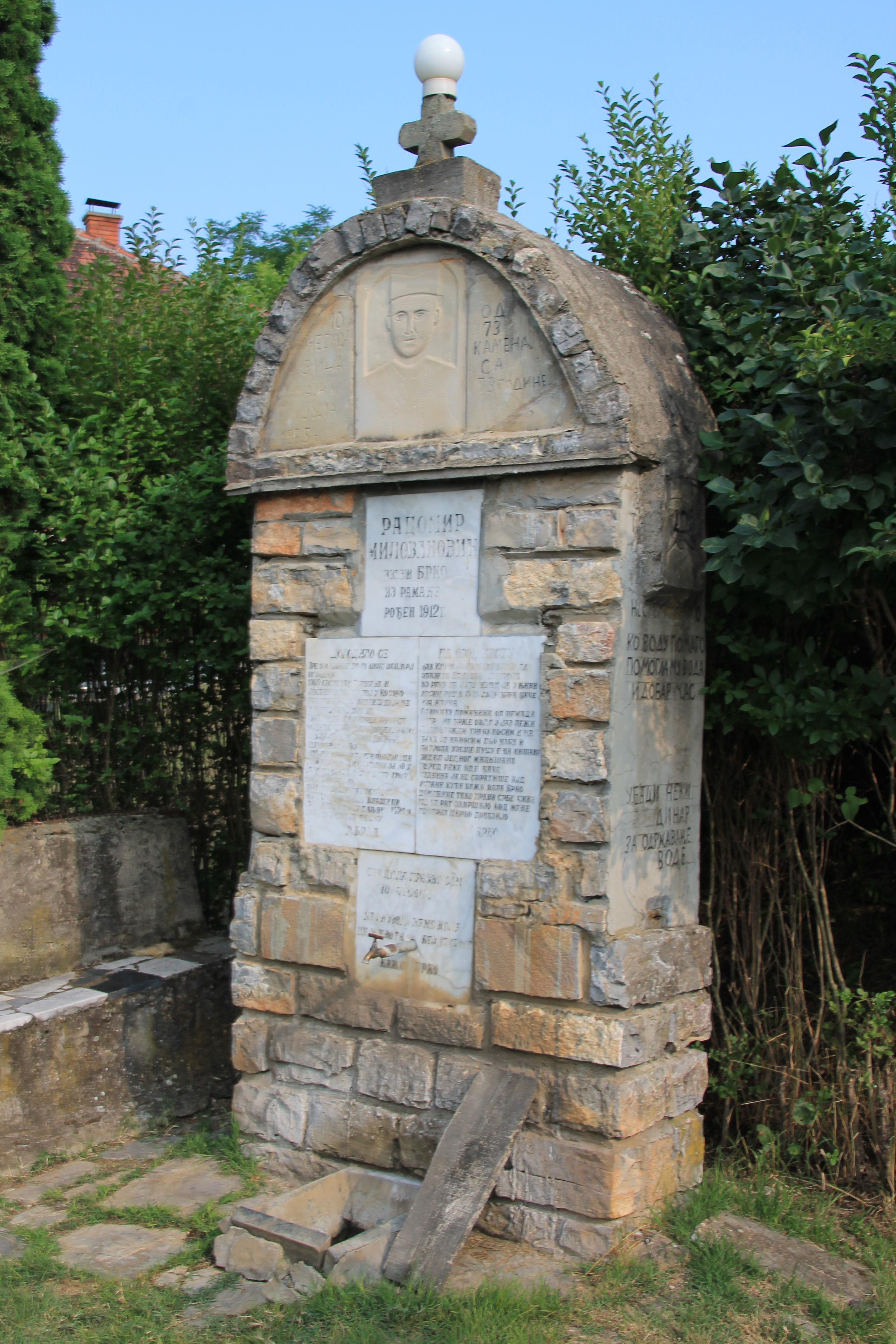 Ramaća - česma